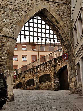 Entrada de la Muralla Medieval